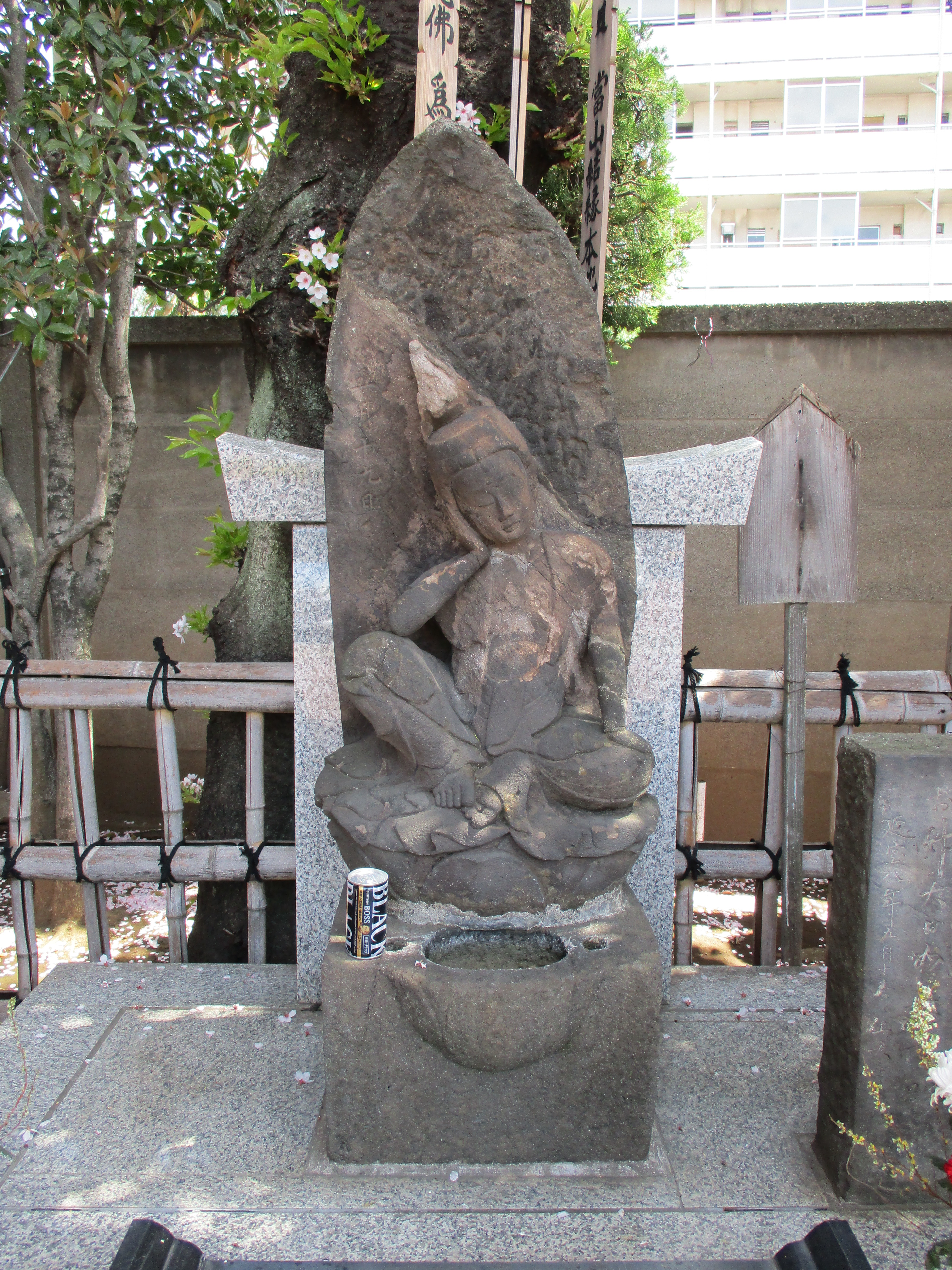 近くから撮影したお竹の墓碑。